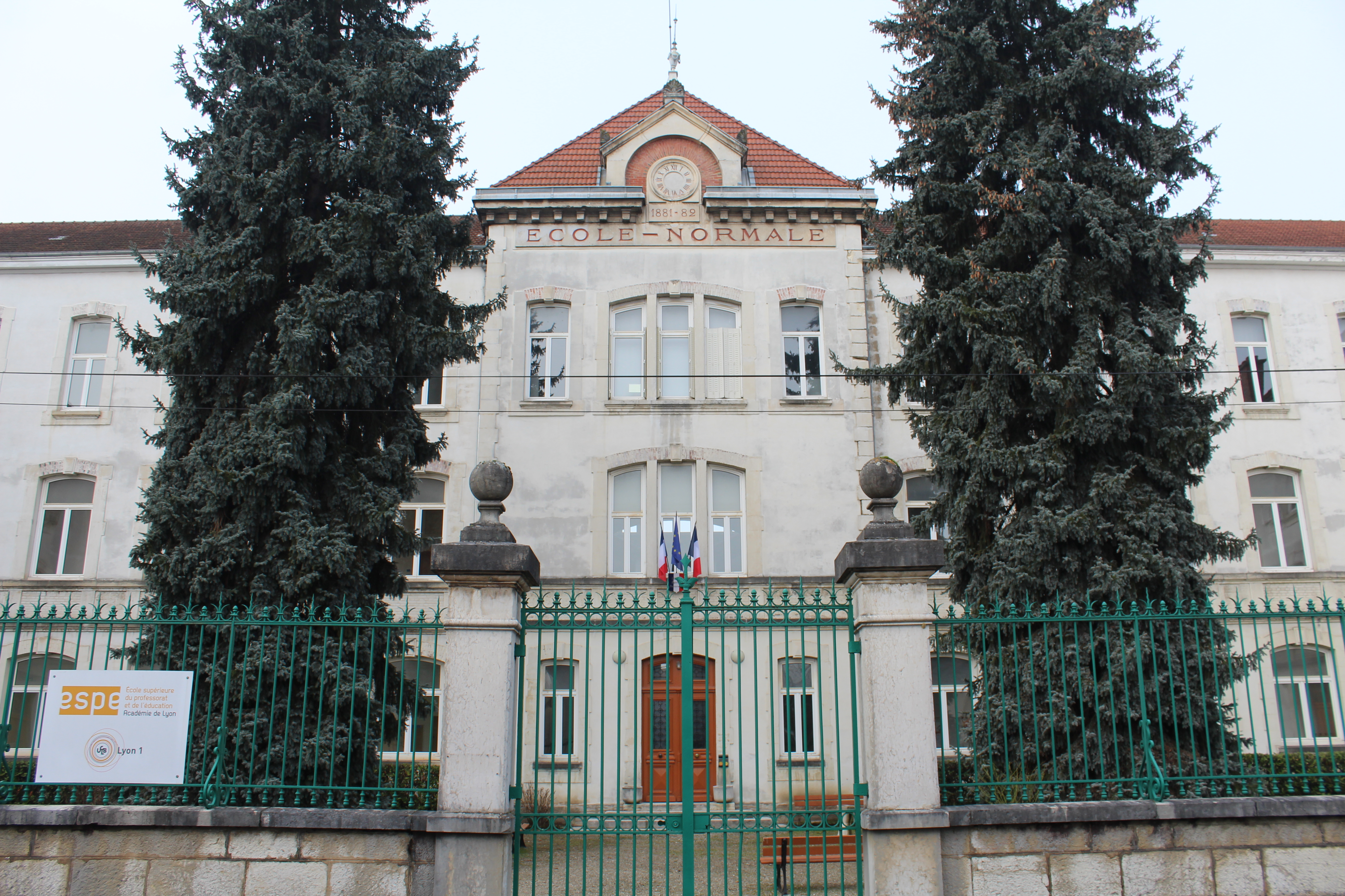 École normale de Bourg-en-Bresse.